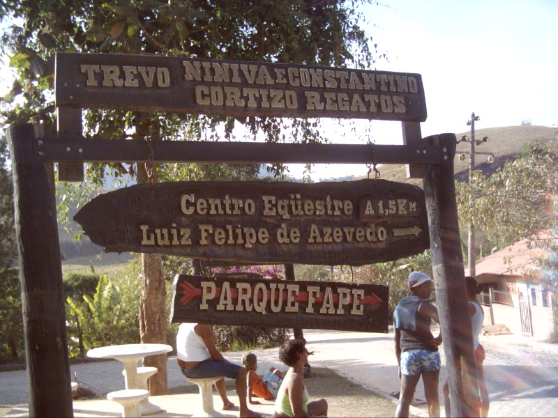 Pracinha no bairro do Pantanal, na divisa com o Marada, em Miguel Pereira, RJ